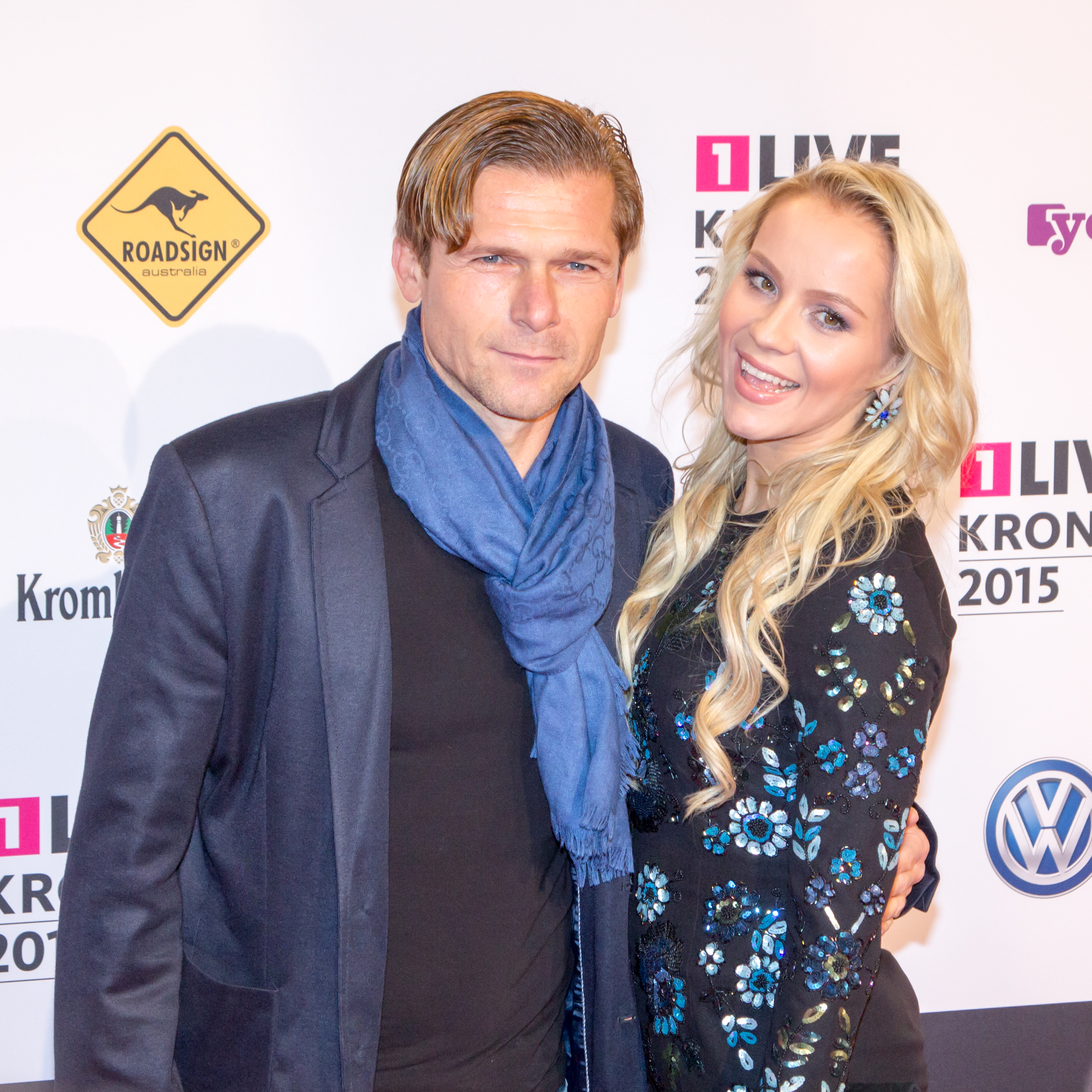 1LIVE Krone 2015 - Dariusz Wosz und Nika Krosny